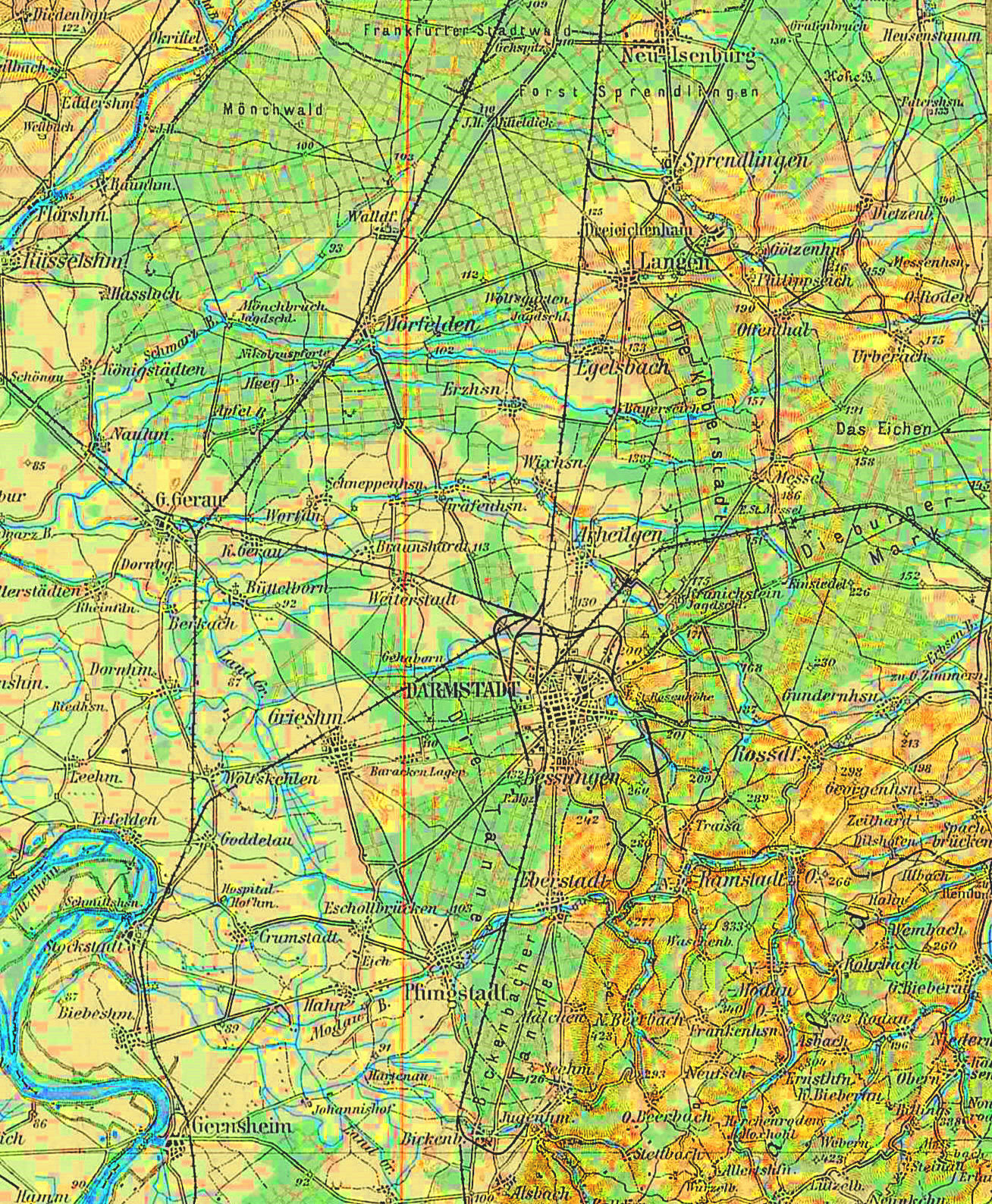 Landkarte des Frankenstein-Komplexes und des Sprendlinger Horstes (Odenwald)